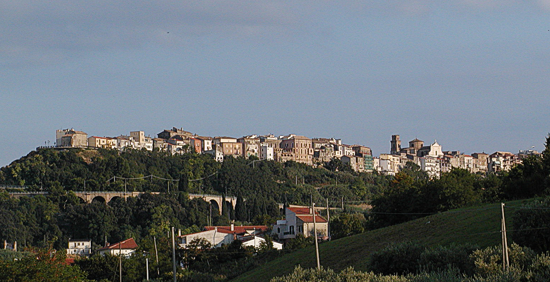 Panorama San Vito Chietino